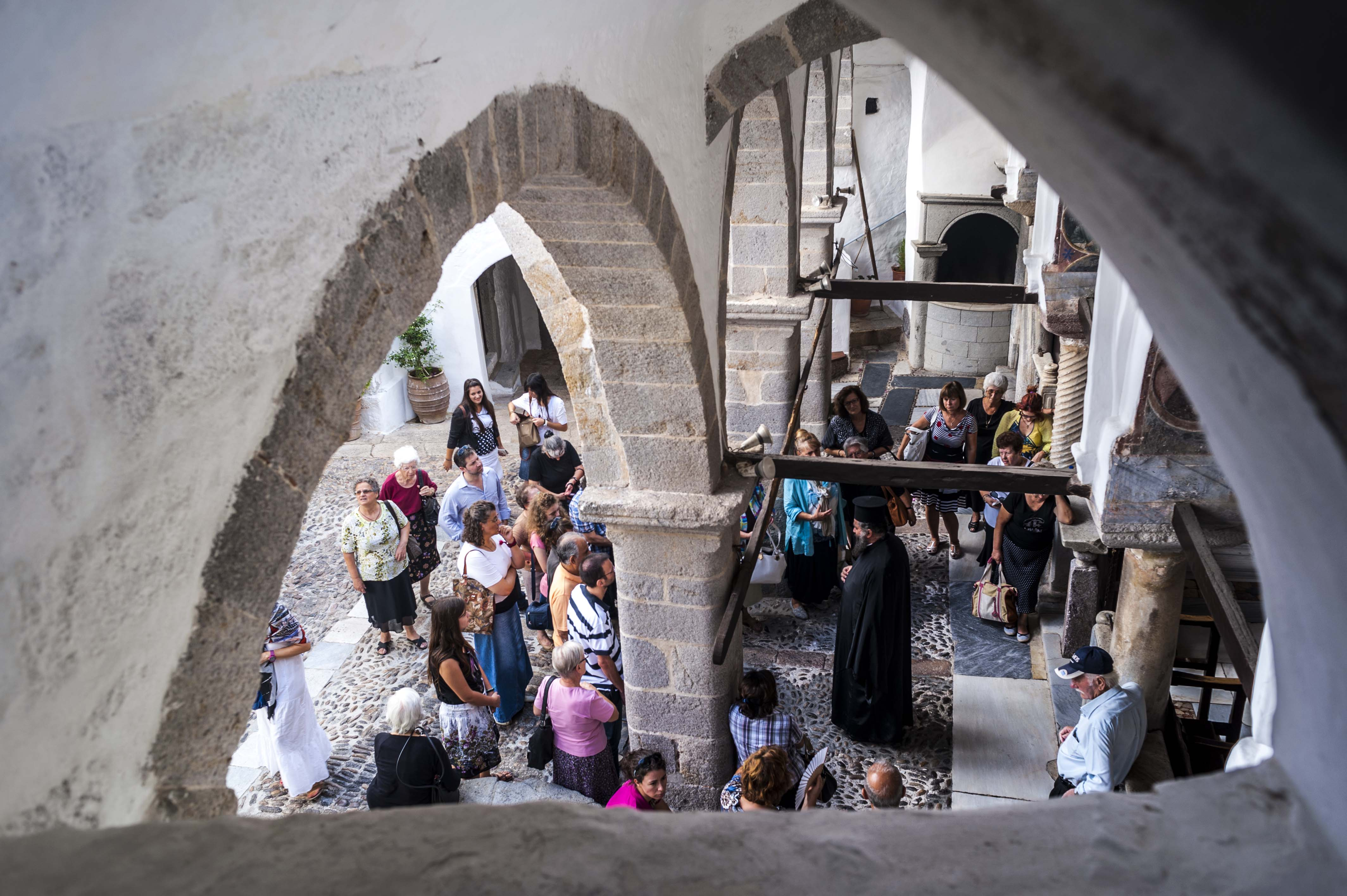 Το Μοναστήρι του Αγίου Ιωάννη του Θεολόγου στην Πάτμο εσωτερικά.